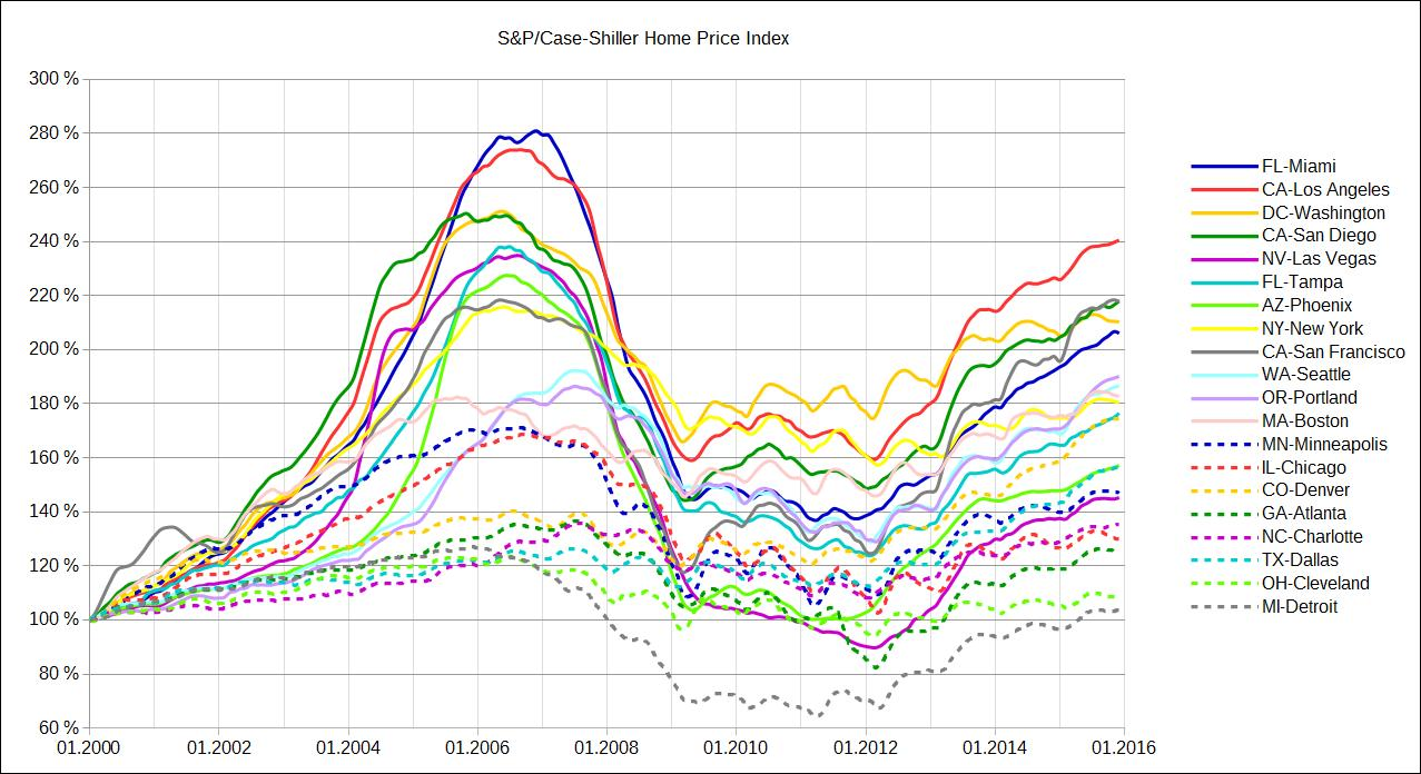 Indice Case-Shiller (Période 2000-2008) pour les 20 principales métropoles américaines réalisé à partir des données publiées par Standard&Poor's